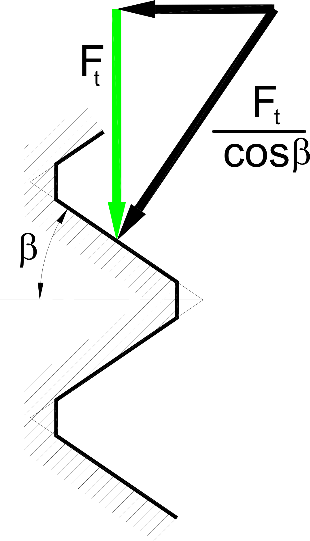 Élesmenet erőjátéka